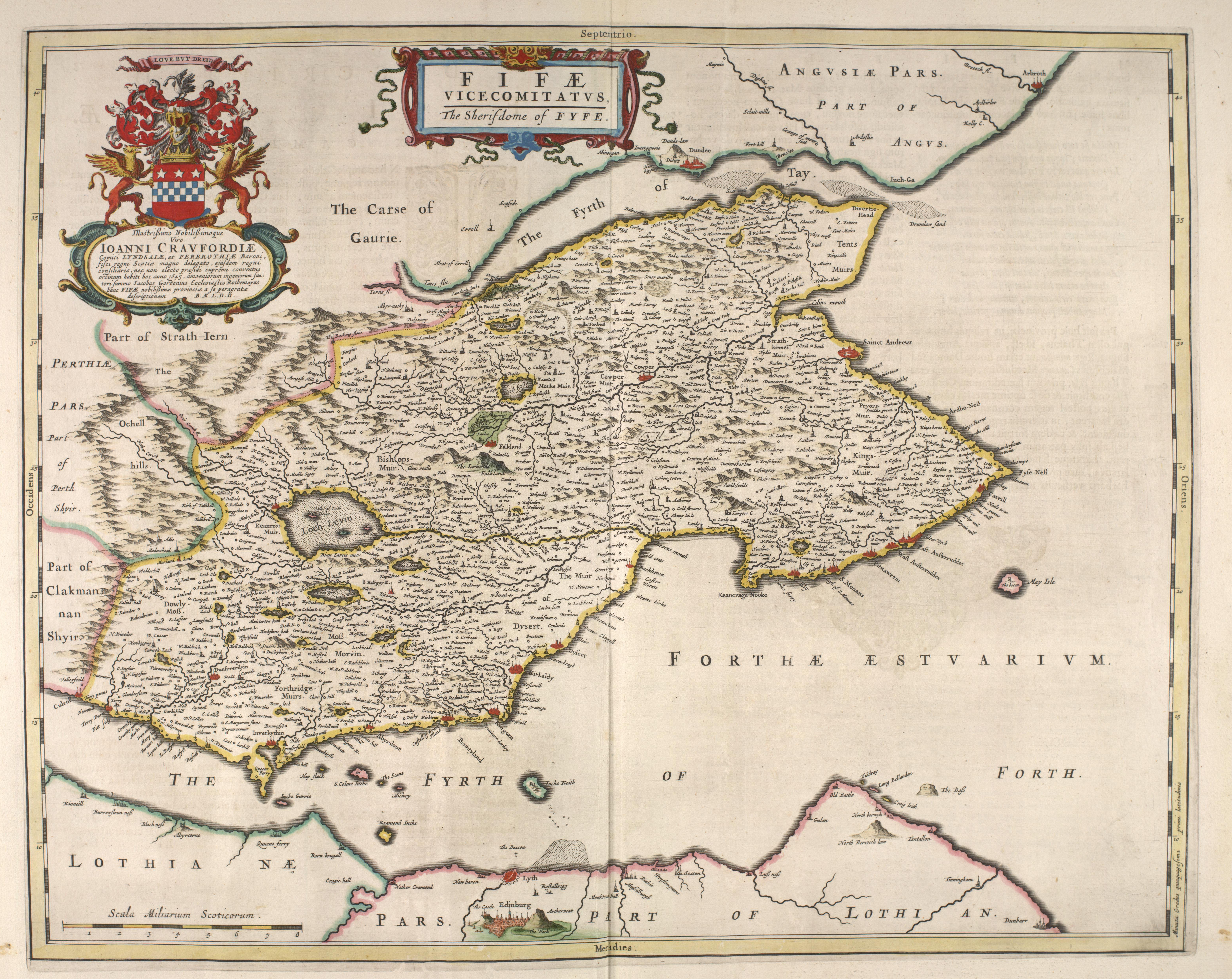 FIFÆ VICECOMITATUS - Fife